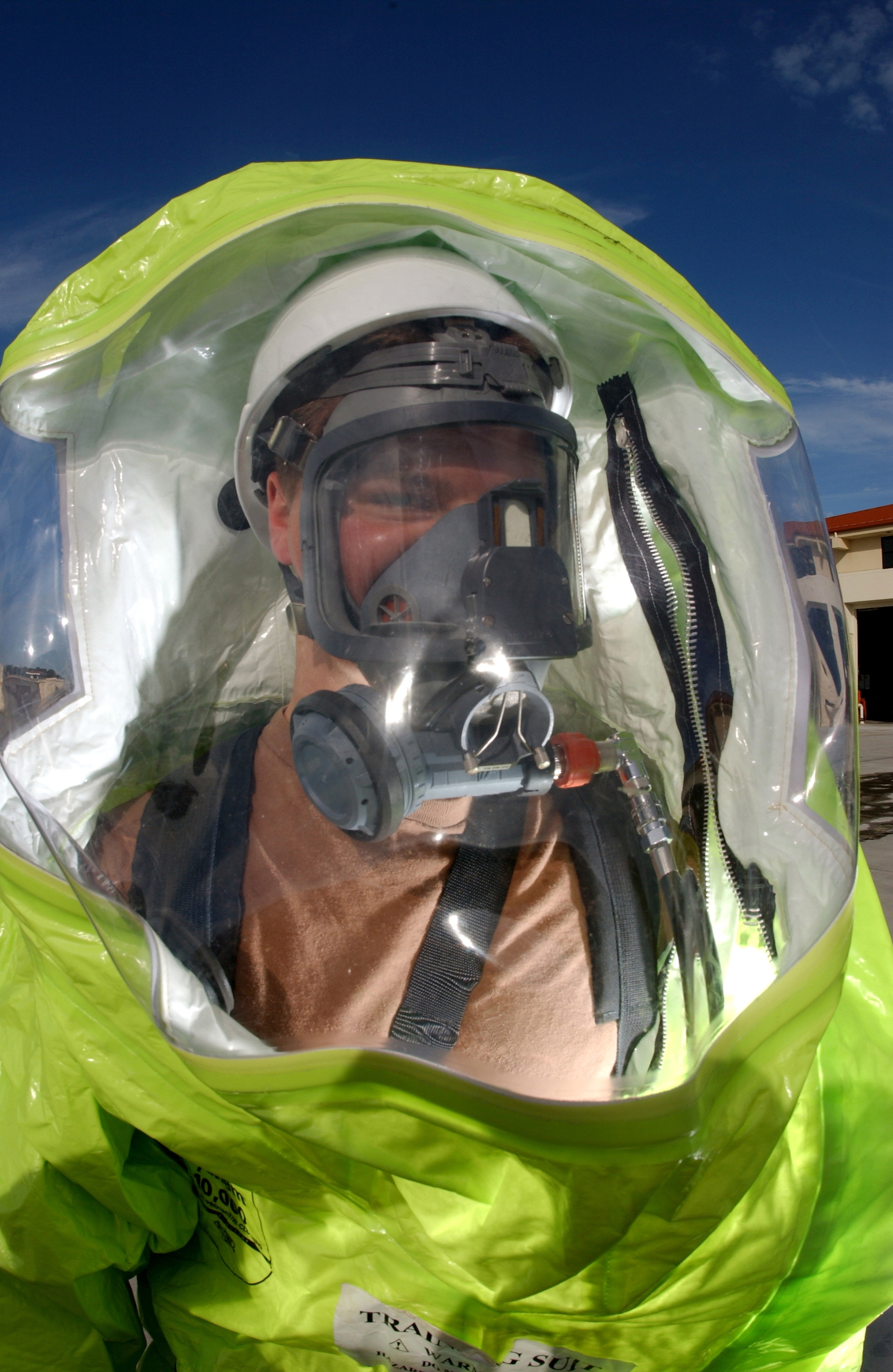 U.S. Air Force Senior Airman Patrick Keenan, an explosive ordnance disposal administrator with the 6th Civil Engineering Squadron, puts on an Interspiro HAZMAT mask and suit during a level-A chemical munitions training class with fire department personnel on MacDill Air Force Base, Florida, USA